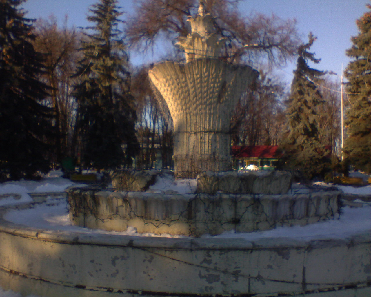 Центральний парк у Вінниці